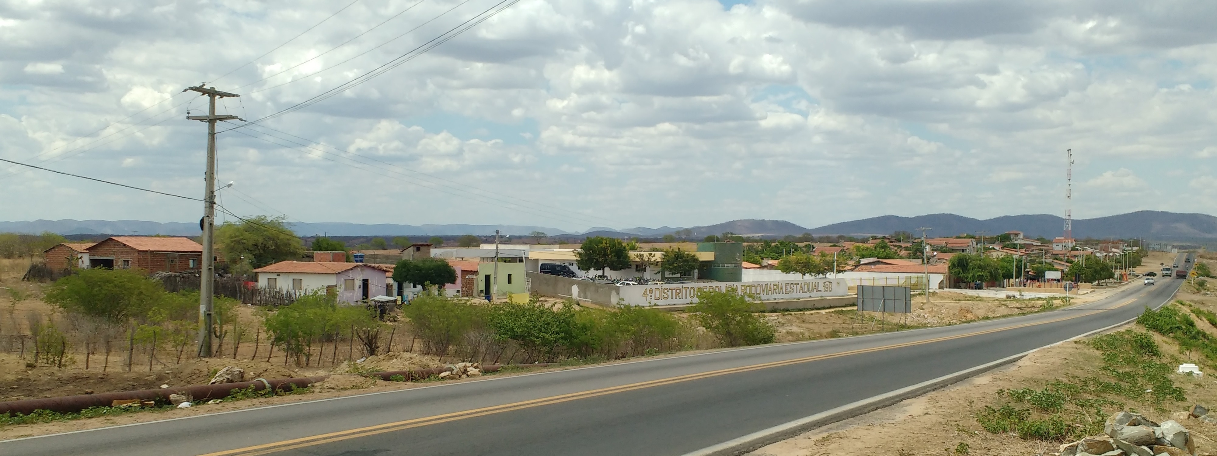 Conjunto habitacional Manoel Domingos em Pau dos Ferros, Rio Grande do Norte (Brasil), na saída para São Francisco do Oeste.